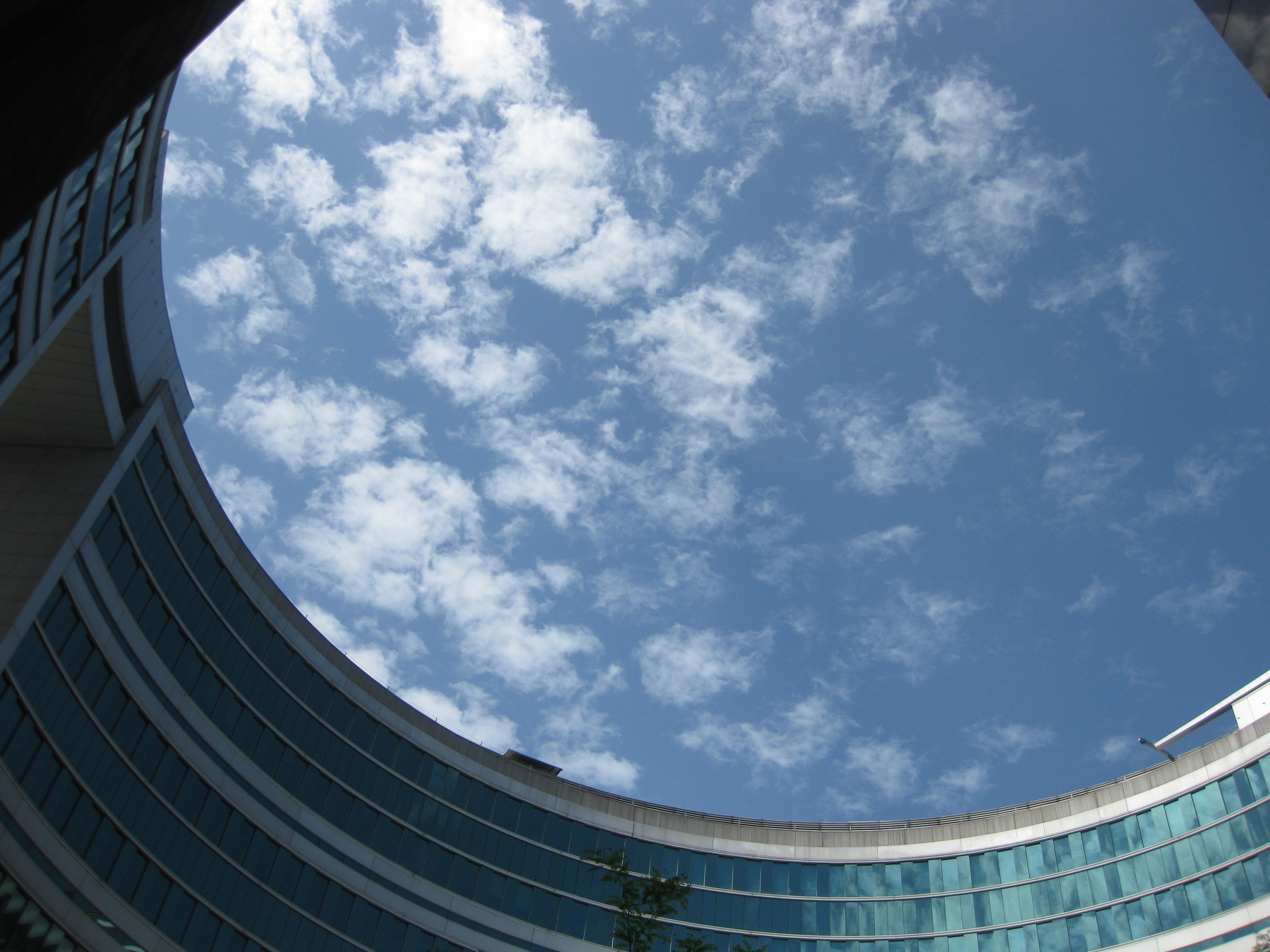 Omega-Haus, Offenbach. Gebaut als Rechenzentrum der Hessischen Sparkassenorganisation (RHSO). Heute: Sparkasseninformatik